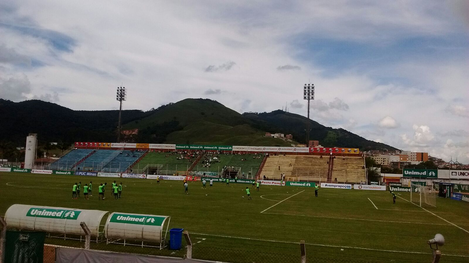 Imagem interna do Estádio Ronaldão, antes do jogo entre Caldense e Uberlândia válido pelo Campeonato Mineiro de 2016.